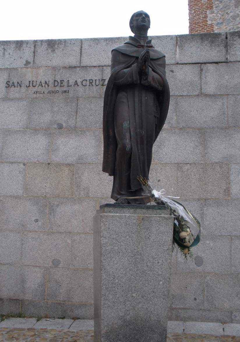 Monumeto a San Juan de la Cruz, Ávila